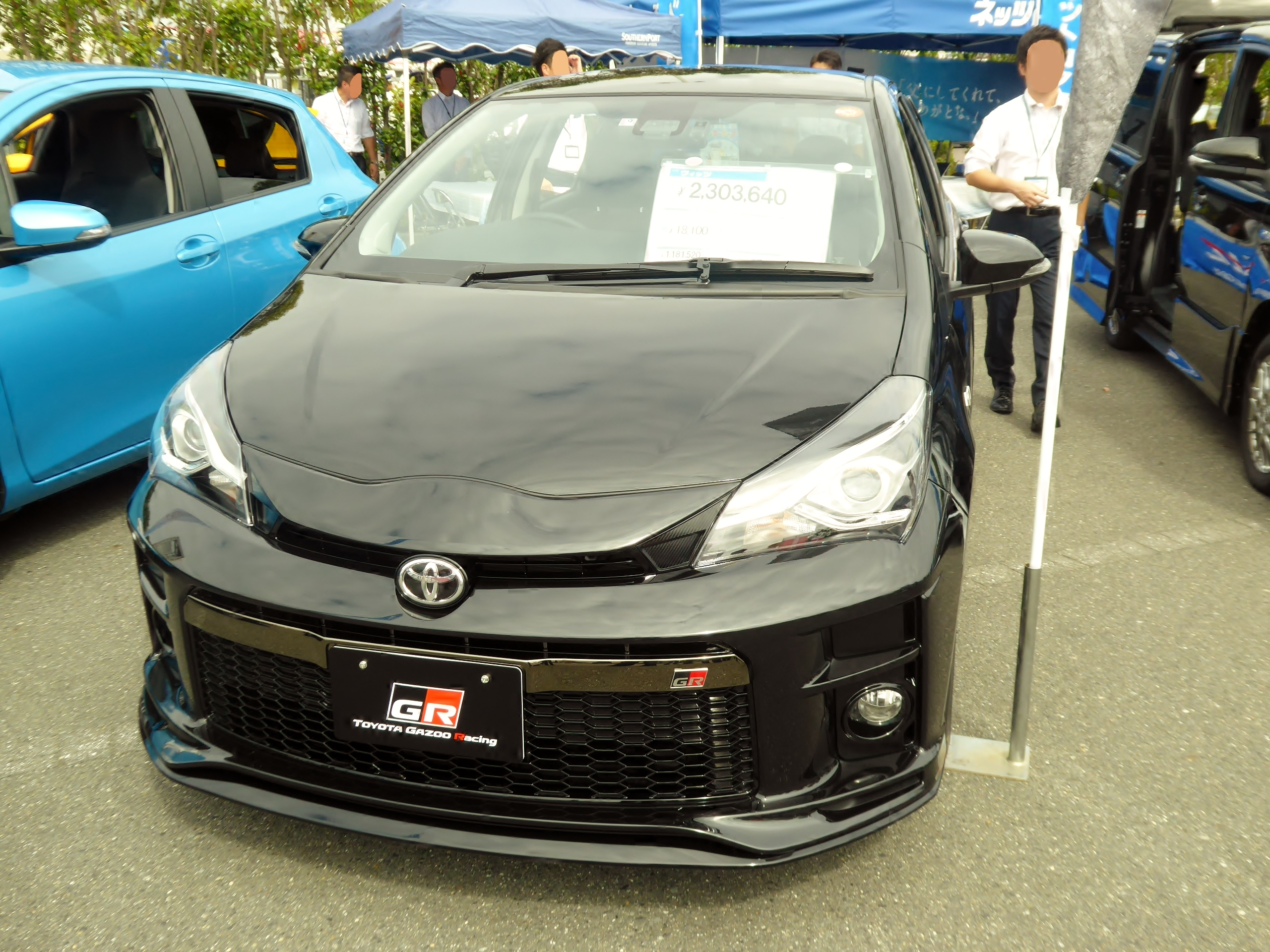 DBA-NCP131-VLXBXV型トヨタ・ヴィッツGR SPORT"GR"をフロントから撮影。